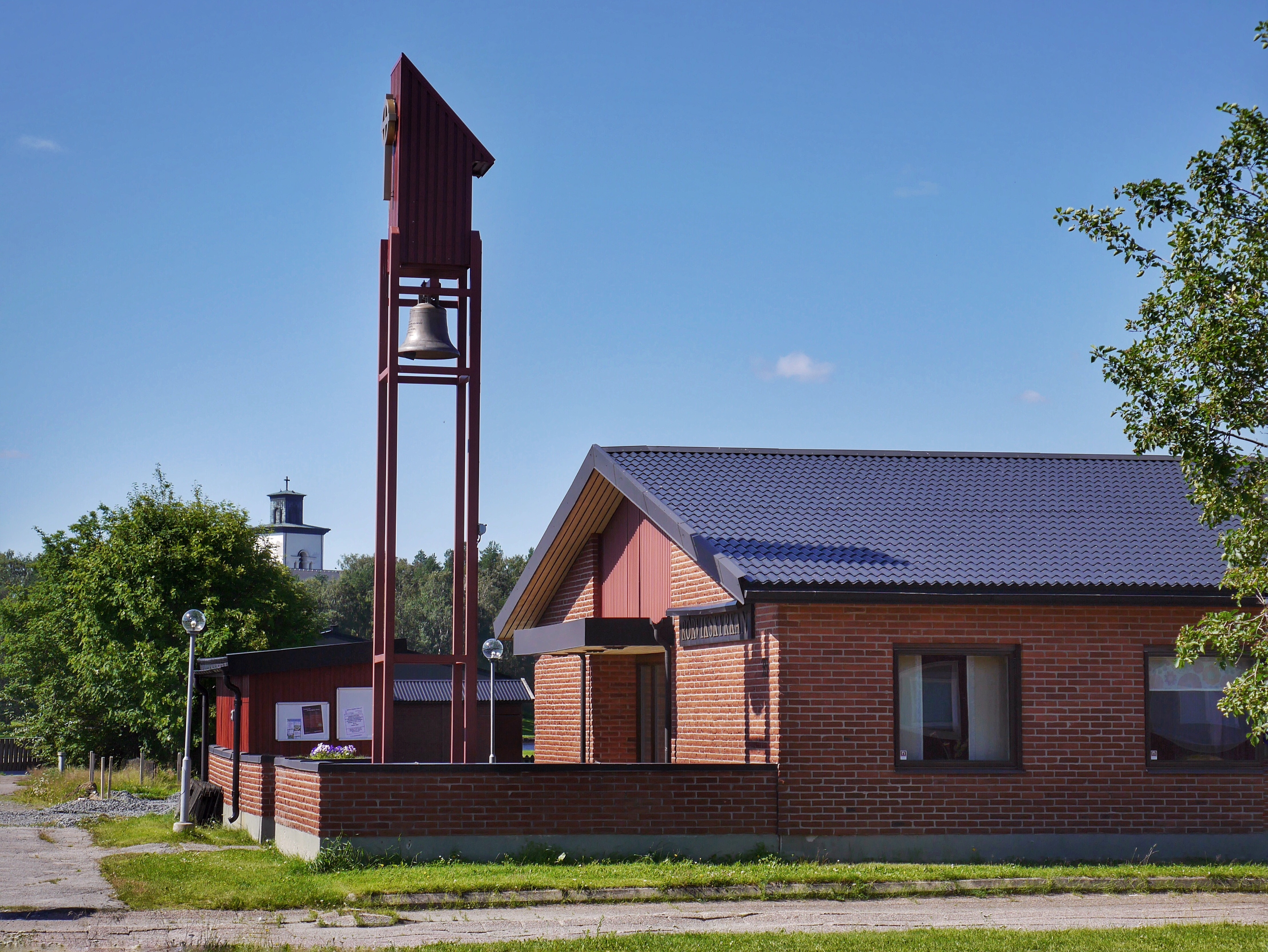 Rörvikskyrkan i Boden invigdes 1973 och fungerar som stadsdelskyrka i Överluleå församlings norra distrikt. I bakgrunden syns Överluleå kyrka.